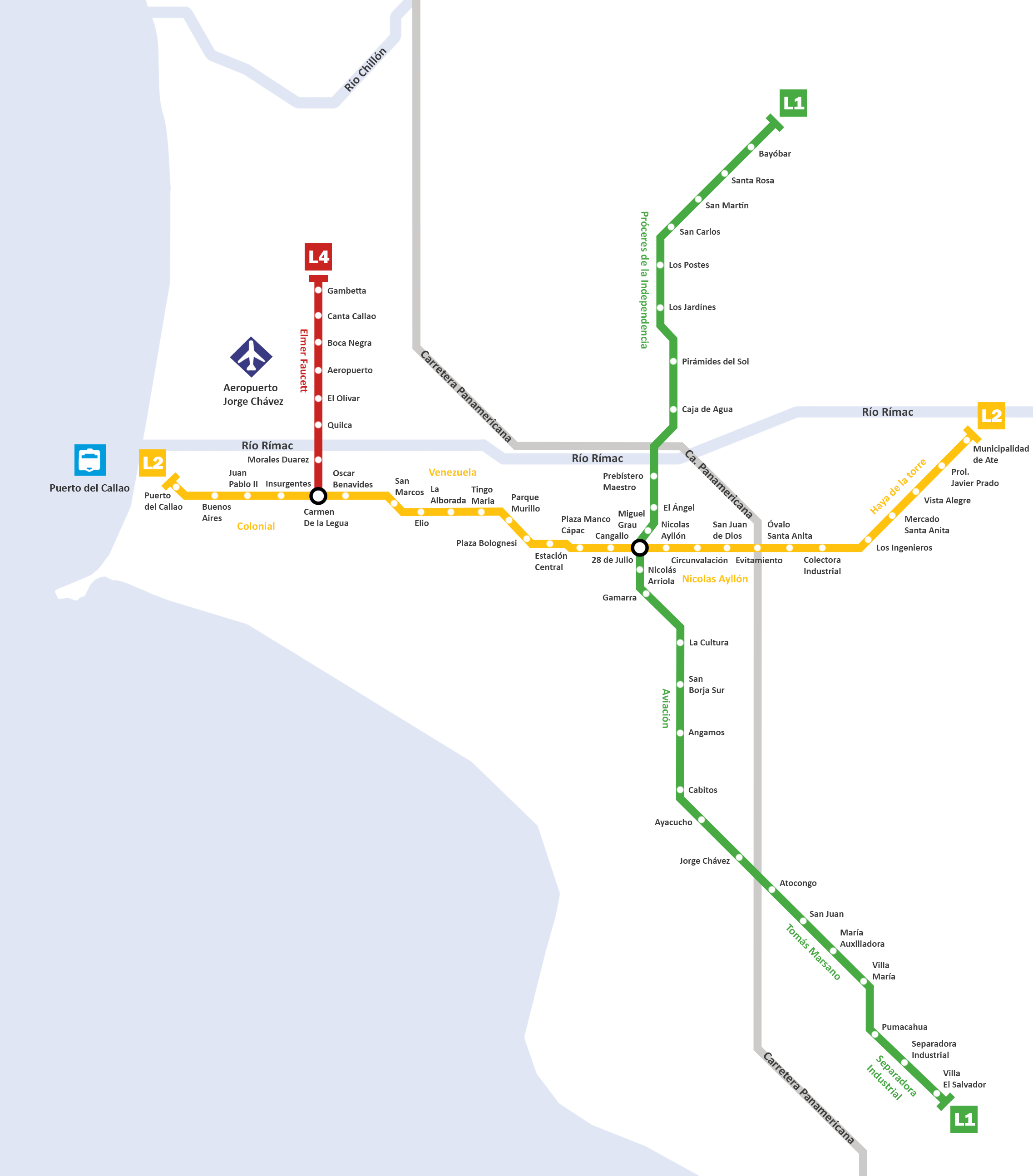 Red actual del Metro de Lima